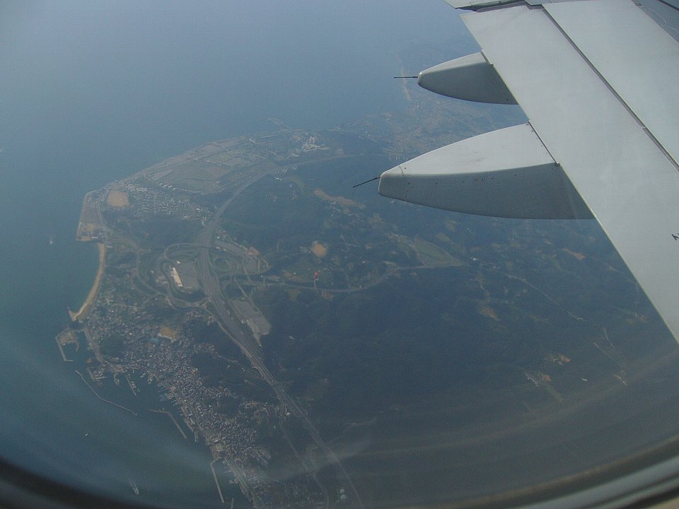 淡路市岩屋上空から岩屋港・淡路ICを望む